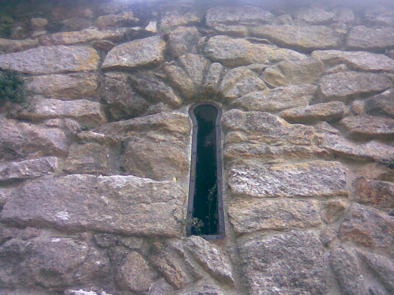 Saeteira da capela Torres do Oeste